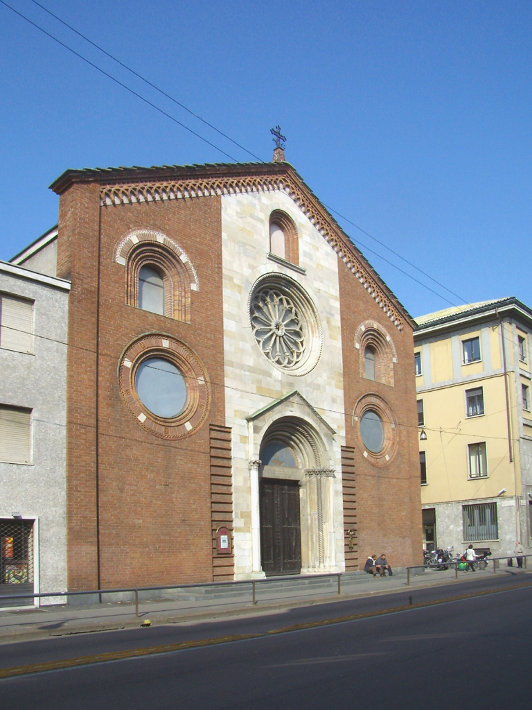 Facciata di San Giovanni in Conca in via Francesco Sforza a Milano